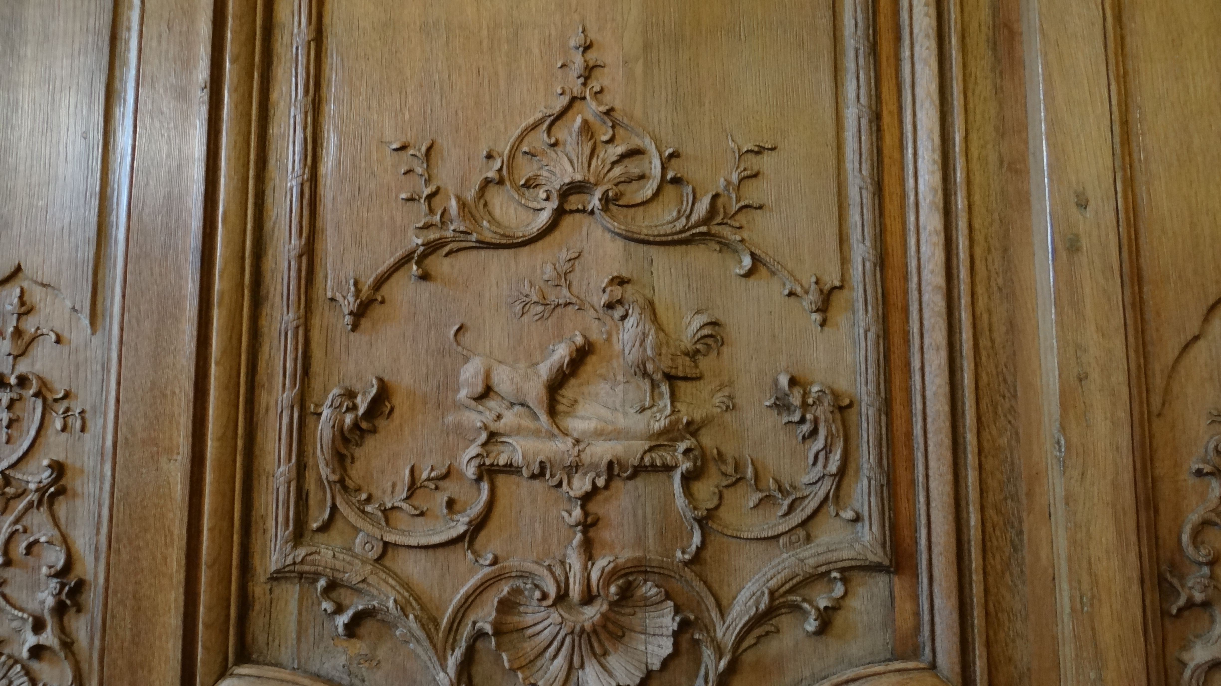 fable de La Fontaine, le coq et le renard, Boiseries de la salle à manger de l'Hôtel de Noirmoutier, Paris .